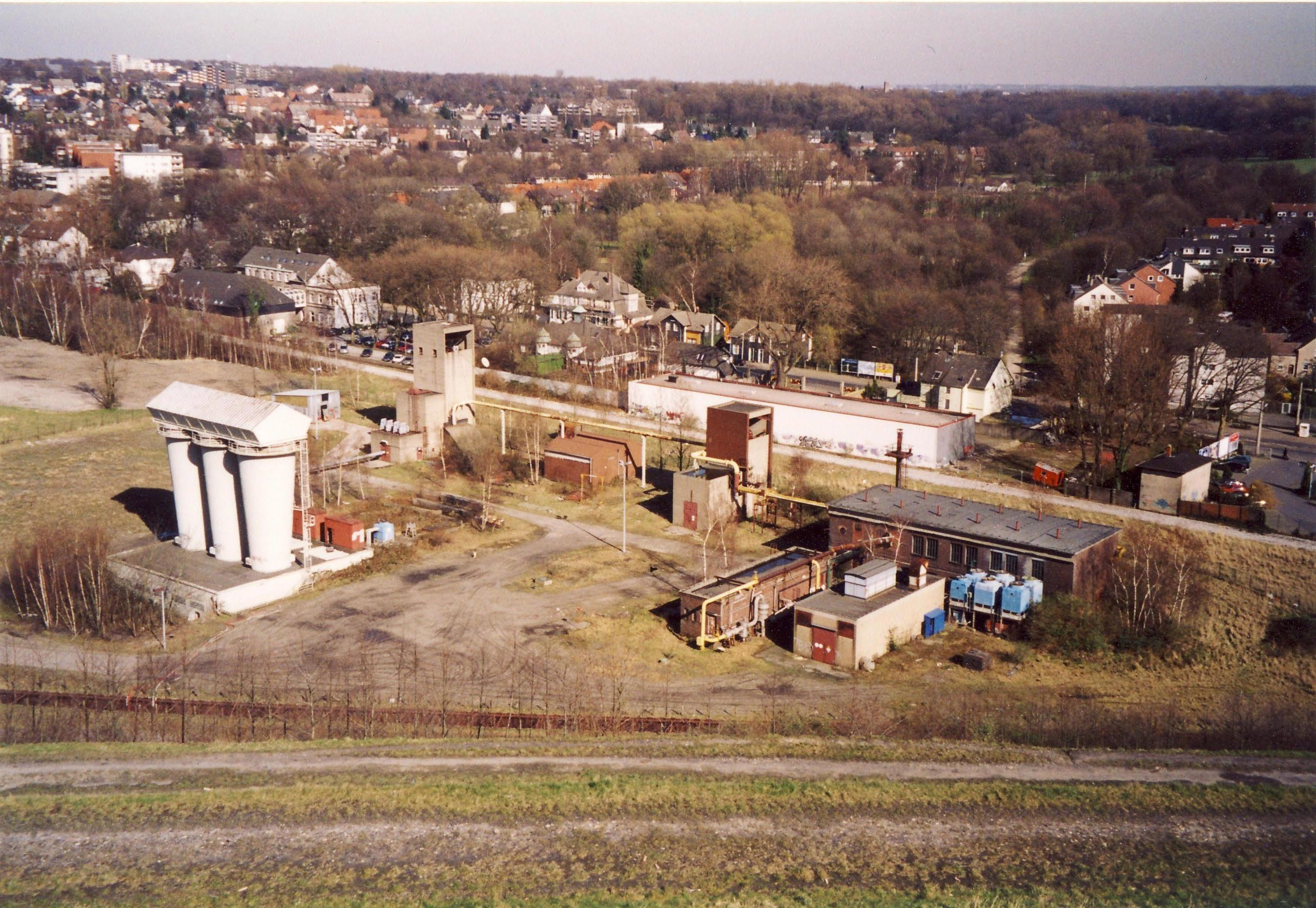 Bergwerk Hugo Schacht 1/4 mit Grubengasabsaugung